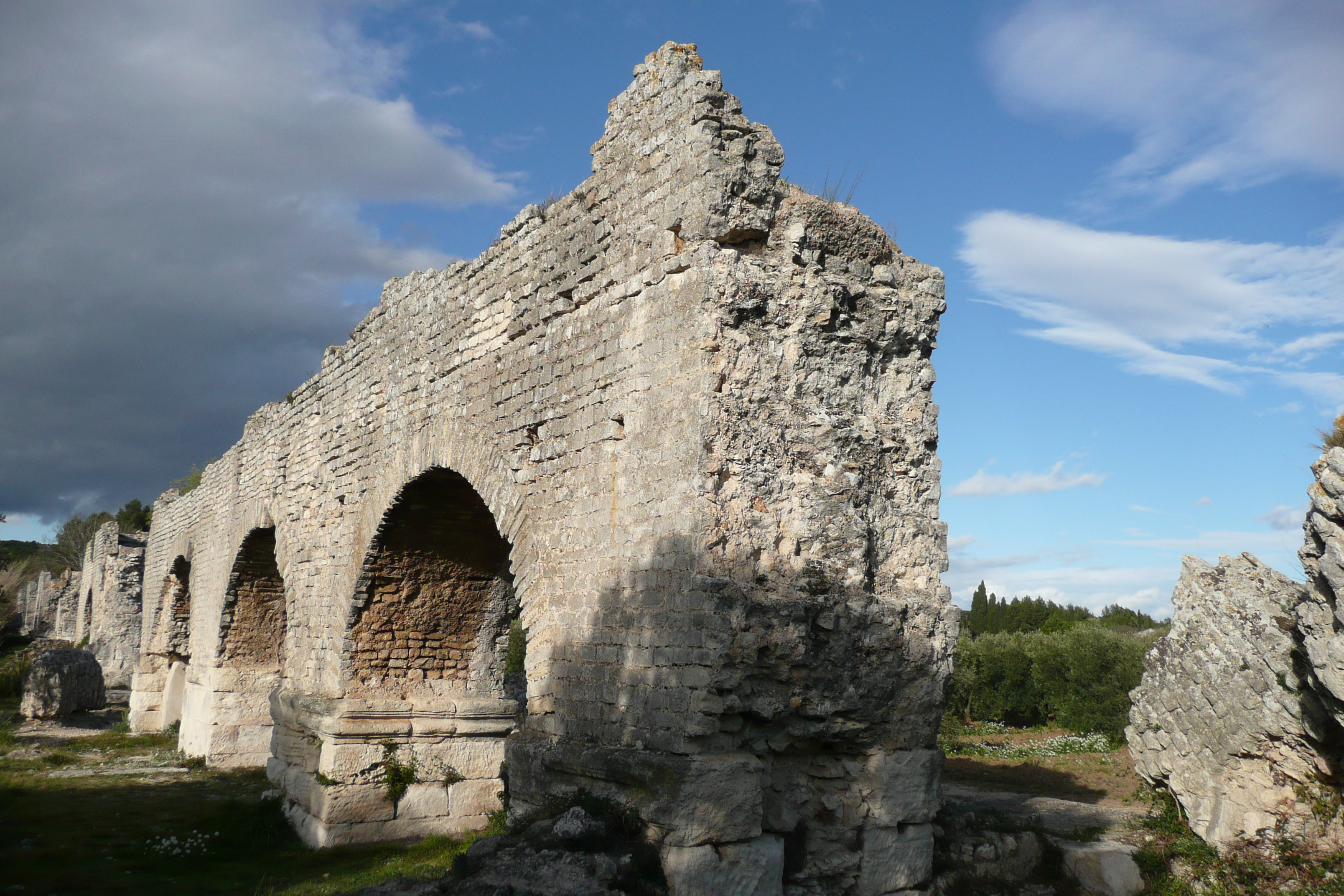 Aqueduc Romain près de Fontvieille.